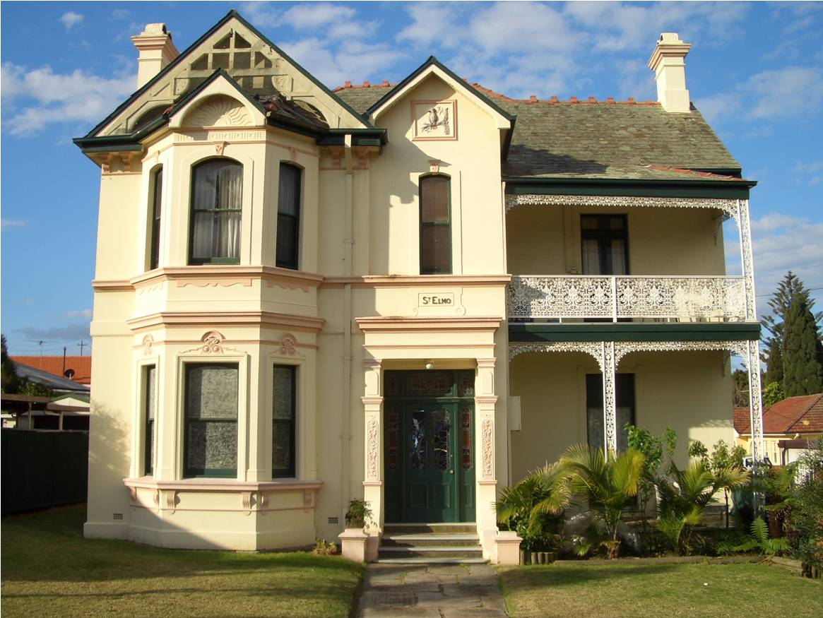 Bexley, Sydney